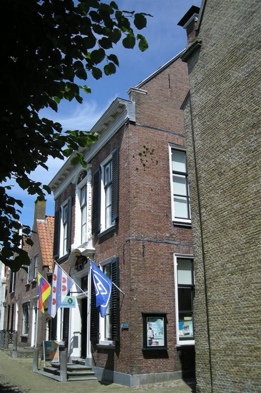 Voormalig stadhuis. Museum Sloten